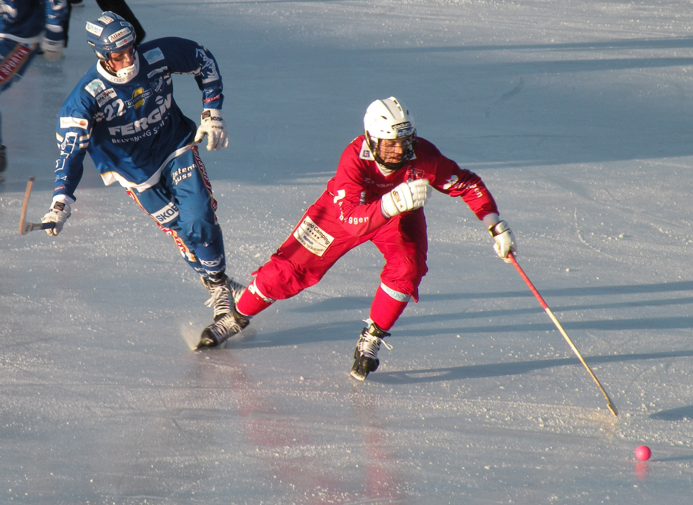 Jagar han som jagar bollen. Matchen IFK Motala-Lidköpings AIK (8-1) i Bandyallsvenskan.